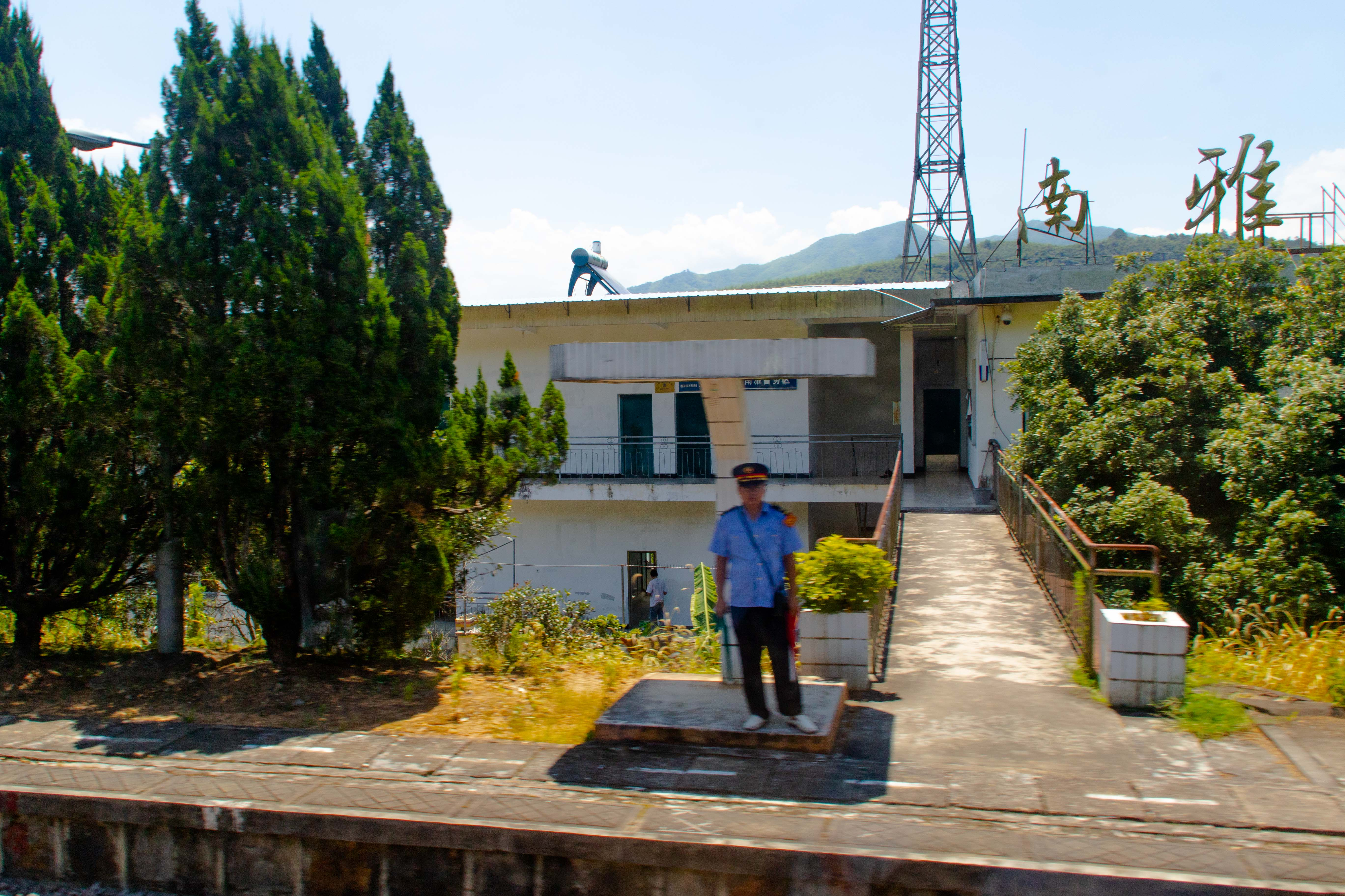 南雅站站房